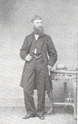 John Schønning. Bildet er fra midten av 1800-tallet, og bildeopphasrett løper ut etter 70 år.